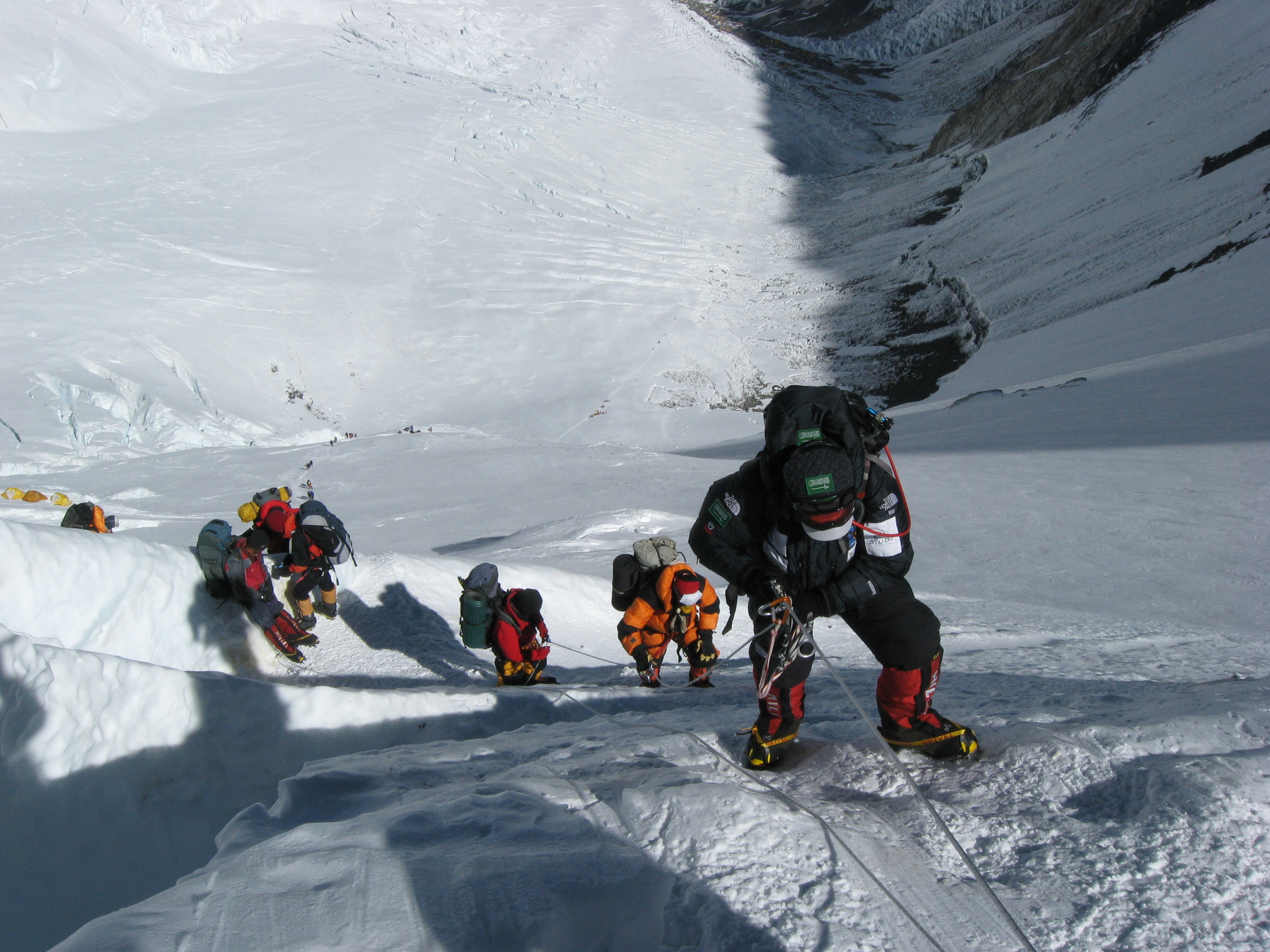 فاروق الزومان قائدا الفريق نحو القمة